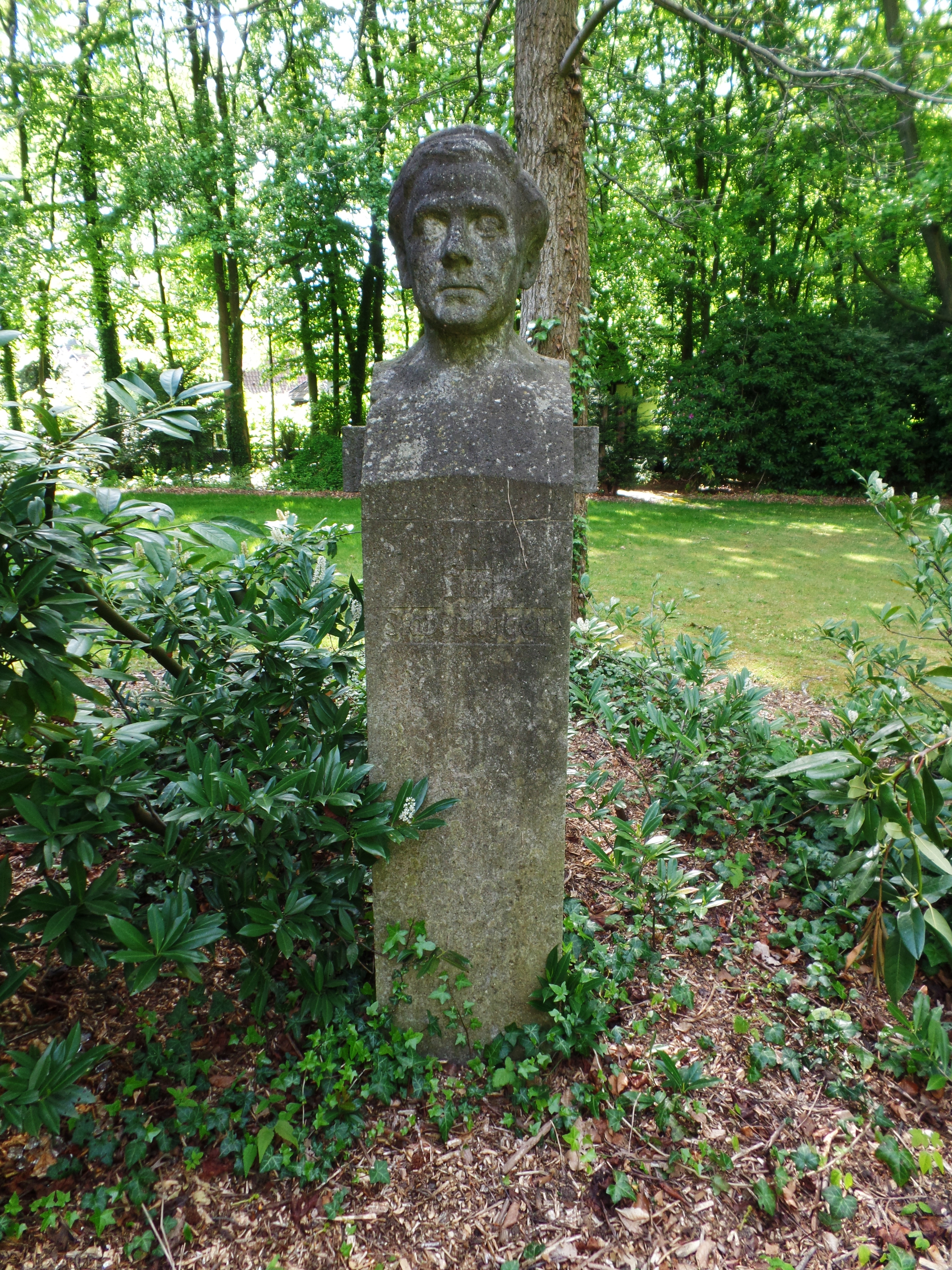 Groß Borstel, Hamburg, Germany